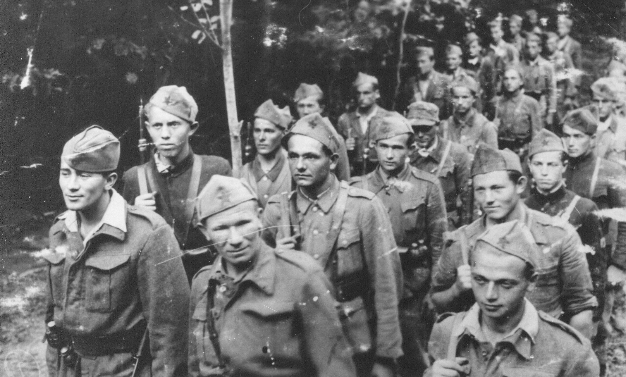 Srpskohrvatski / српскохрватски: Diverzantski bataljon Slavonskog korpusa u ljeto 1943.